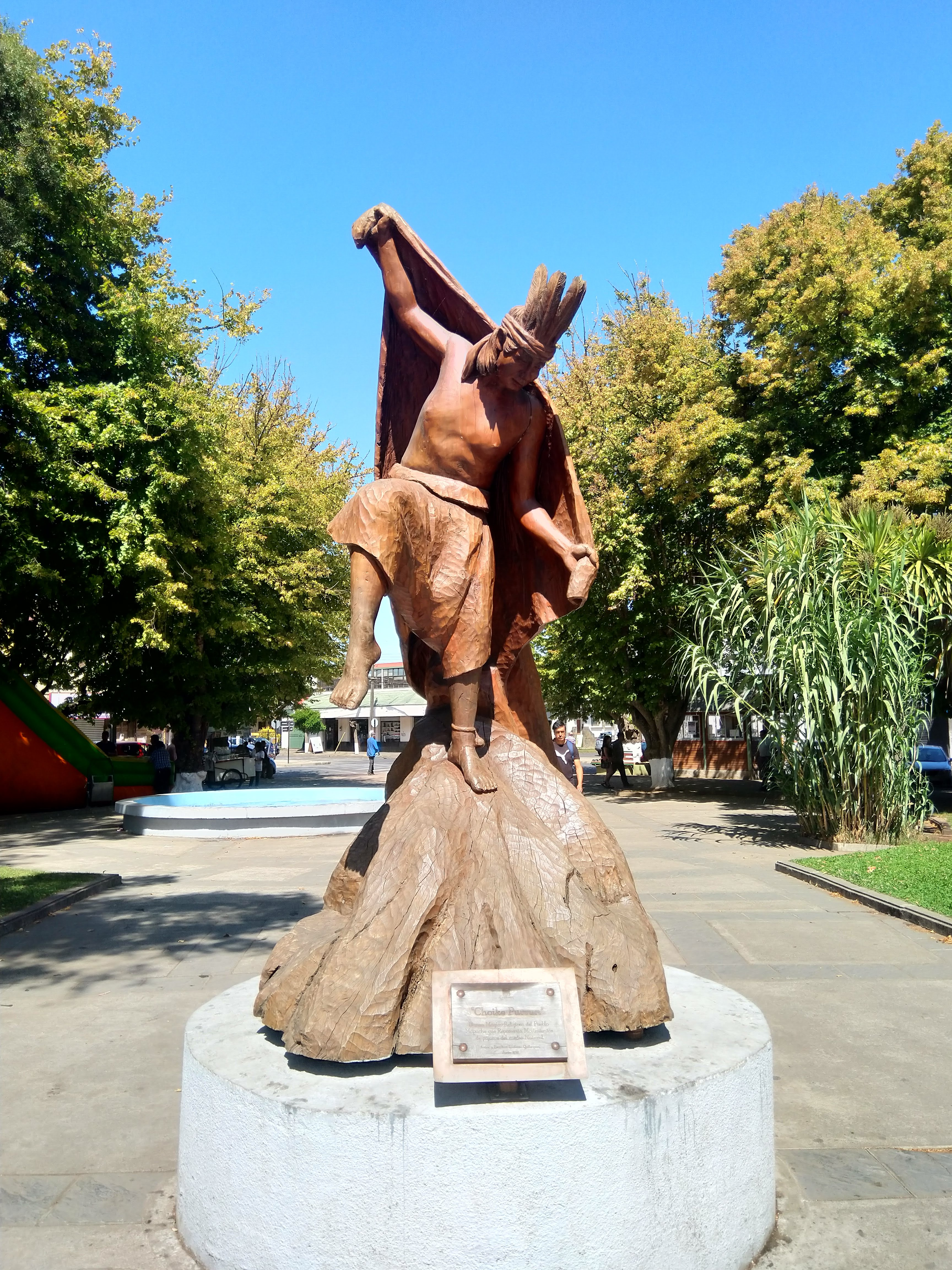 Choike Purrun, danza mágico-religiosa del Pueblo Mapuche que representa movimientos de pájaros del medio natural. Autor y Escultor: Ildefonso Quilempan Junio 2012. Plaza de Nueva Imperial, Región de la Araucania, Chile. Purrún (en mapudungun: pürun, ‘danza, danzar’)? es el nombre que reciben las danzas o bailes tradicionales de origen mapuche. Representan una reproducción de la forma de ver el mundo desde lo mapuche. Muchos de sus bailes constan de naturaleza zoomorfa y sus pasos están inspirados principalmente en animales. Ejemplos de estos son: el Choyke o Chewke Pürun (danza del ñandú), Mara Pürun (danza de la liebre), Wemul Pürun (danza del huemul), Rere Pürun (danza del pájaro carpintero), Tregüll Pürun (danza del queltehue), etc.